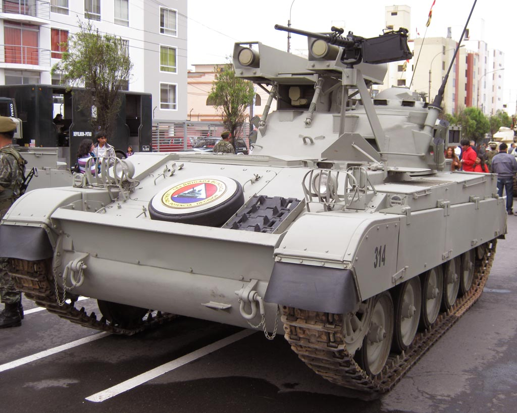 AMX-13 "Alacrán" con montaje Kornet Ejército del Perú en la Parada Militar 2011